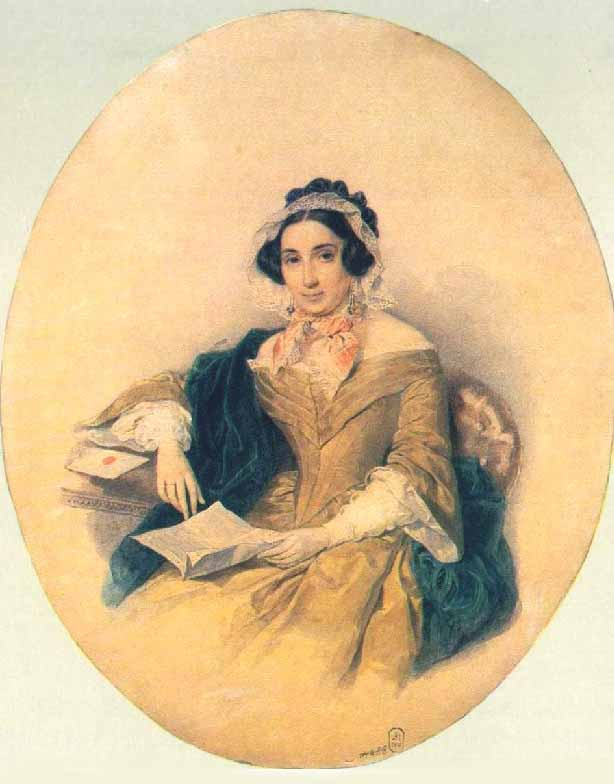 Соколов Петр Федорович. Портет Д.Ф. Фикельмон. 1837г